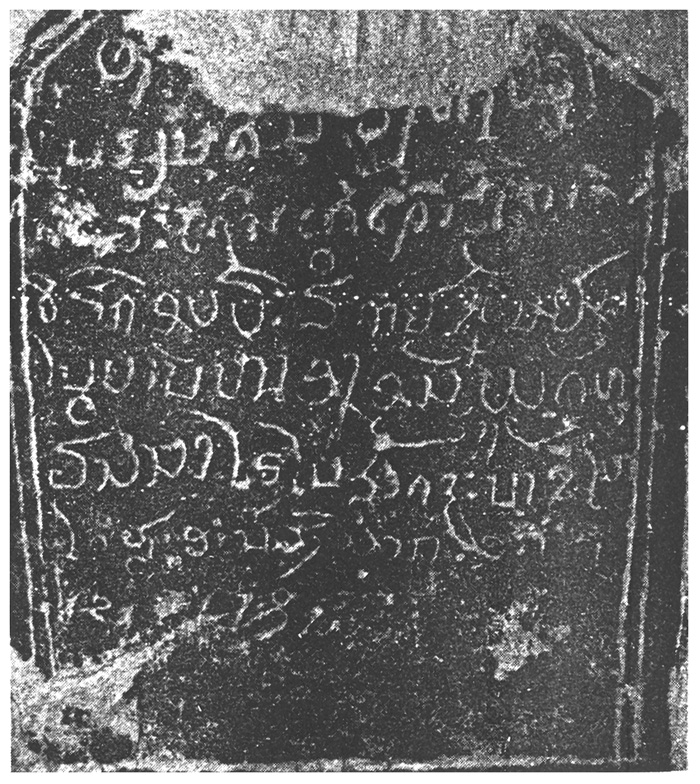 จารึกวัดบ้านหนองอุ่มเป็นจารึกที่ทำจากหินเขียนด้วยภาษาไทยน้อย